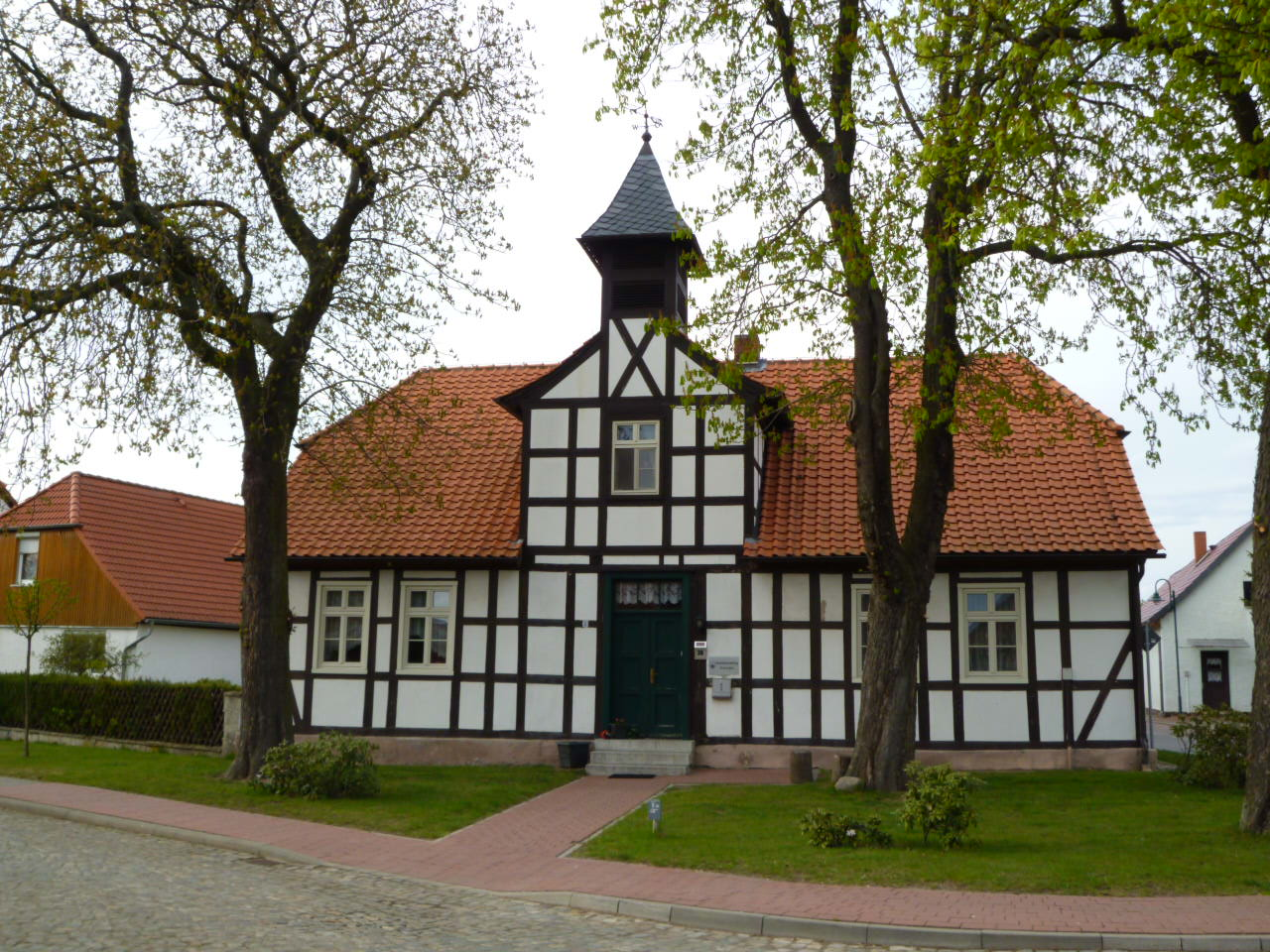 Calvörde-Grauingen, ehemaliges Schulhaus